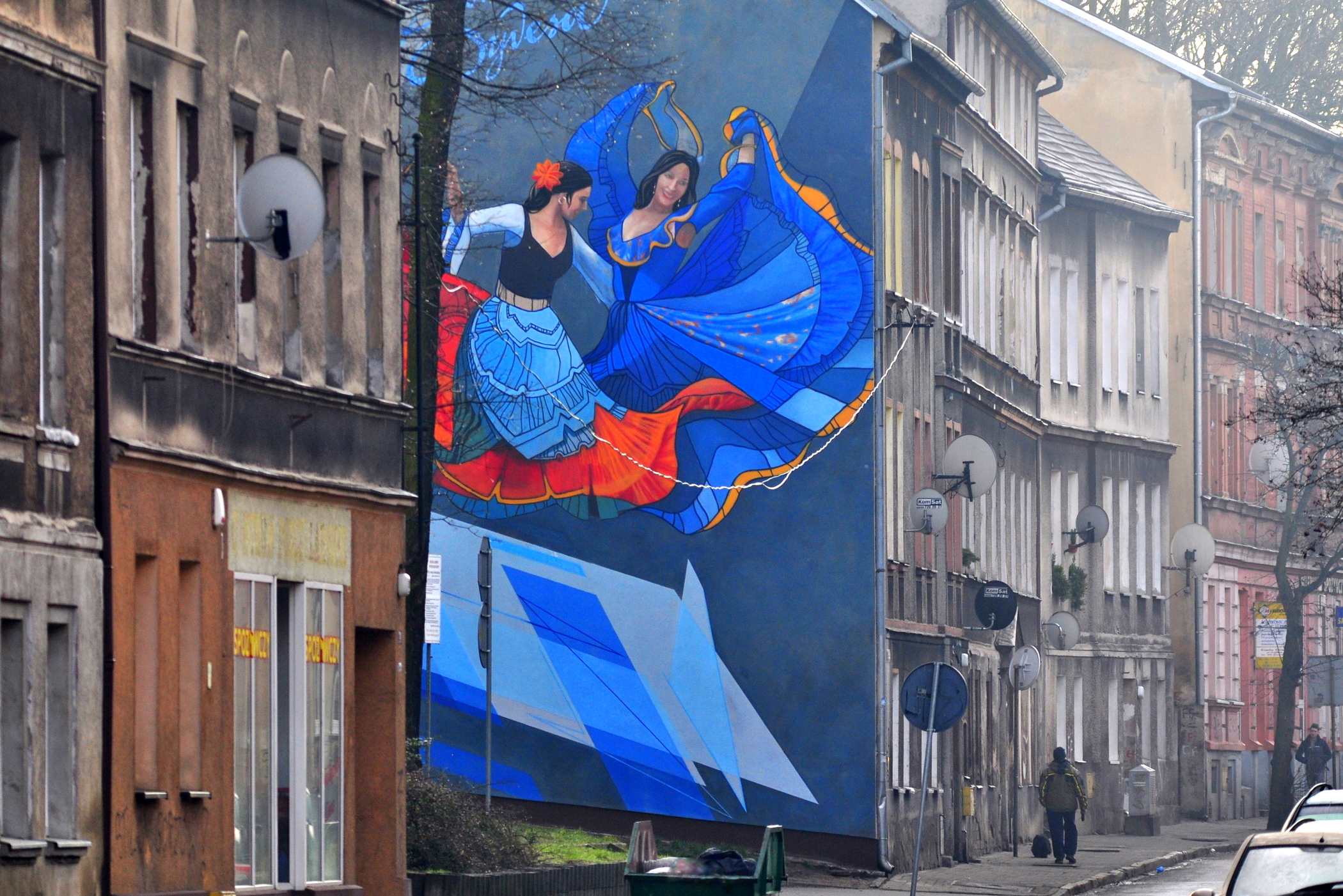 Gorzów Wlkp., ul. Drzymały. Mural propagujący festiwal kultury romskiej - Romane Dyvesa